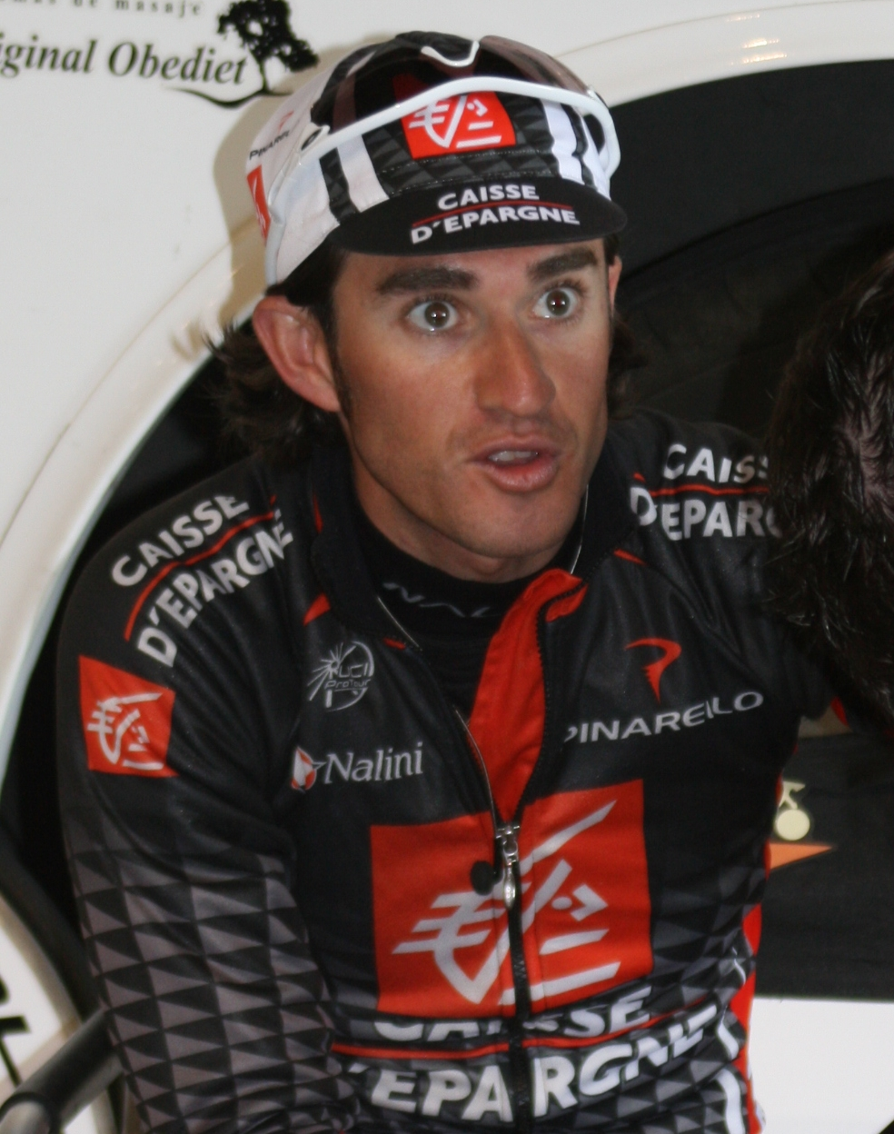 Daniel Moreno, durant les Quatre jours de Dunkerque, à Douai